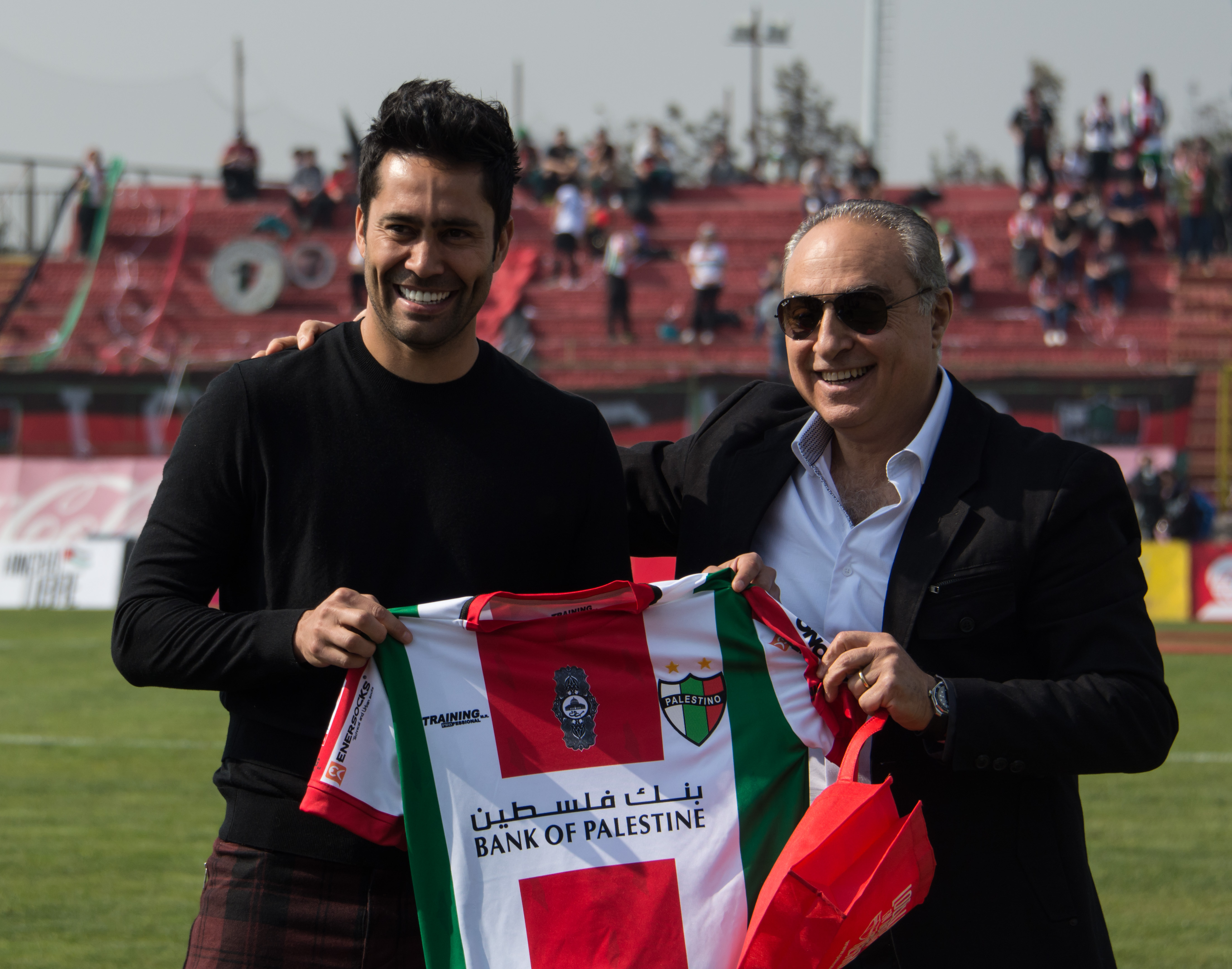 Luis Jiménez y Jorge Uauy, Palestino v Deportes Temuco, Estadio Municipal de La Cisterna, La Cisterna, Santiago, Chile